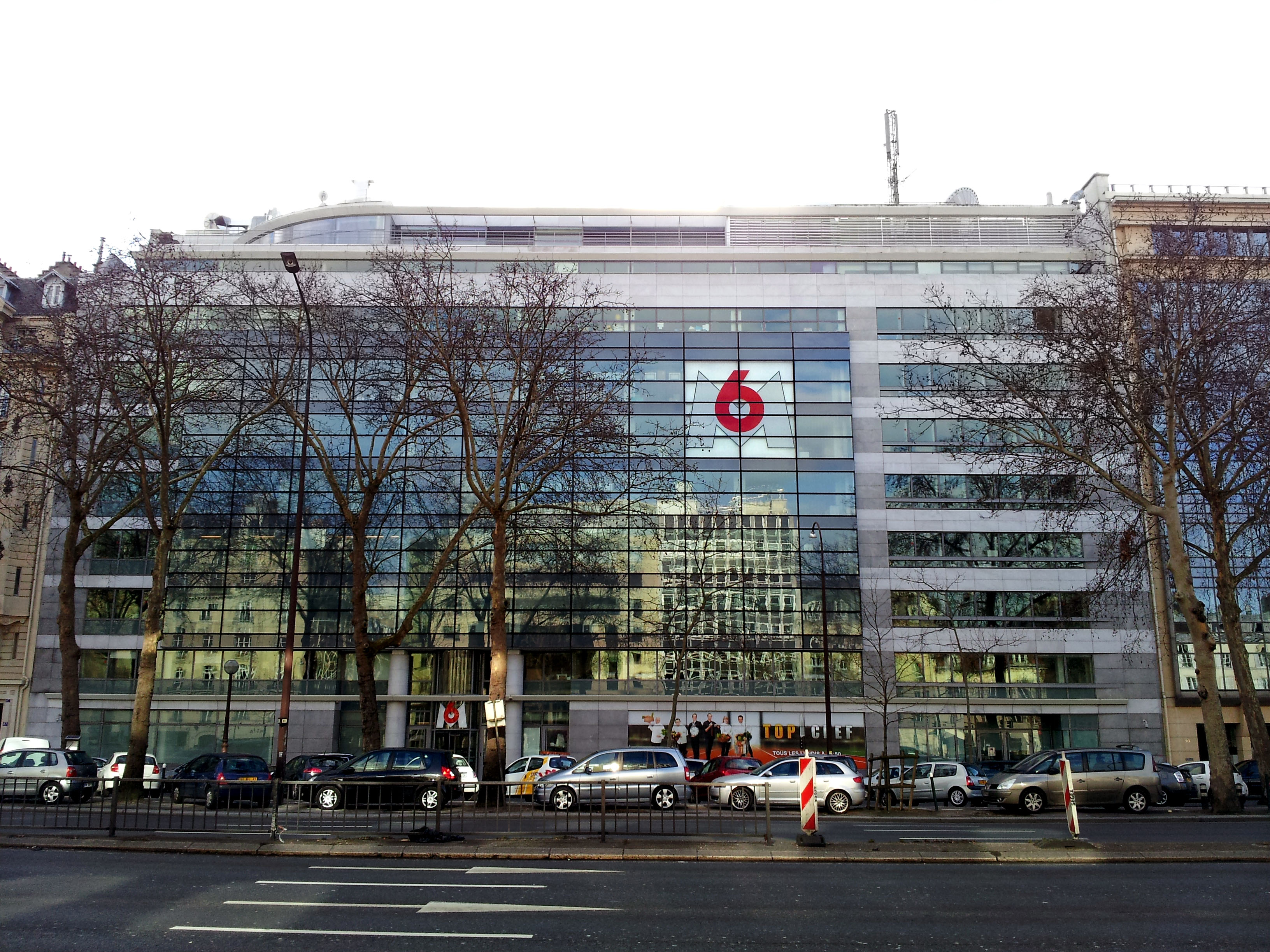 Siège social de la chaîne de télévision française M6 situé au 89, avenue Charles-de-Gaulle à Neuilly-sur-Seine dans les Hauts-de-Seine, France.